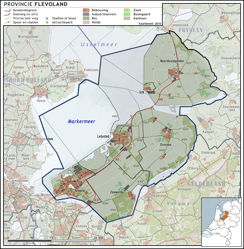 Provincie Flevoland, met indeling van gemeenten (2010) en impressie van het landschap. Door Jan-Willem van Aalst, samengesteld uit publiek beschikbare geo-data: Referentie-ondergrond (kustlijn, steden, wegen) gerasterd uit de OpenStreet Map OSM. ( Inhoud is beschikbaar onder de Creative Commons Attribution-ShareAlike 3.0 license. Referentie-ondergrond op water bewerkt vanuit Gebruik is vrij met bronvermelding NLR en ESA. Vectorgrenzen van gemeenten en regio's vrij ter beschikking gesteld met dank aan cartografen van brandweerregio's Hollands-Midden en IJsselland; gerasterd in Photoshop. Hoogte-aanduidingen (reliëf) gerasterd uit de AHN Viewer ( gebruik is vrij met bronvermelding (c) AHN, Overige kenmerken op de kaart: eigen tekenwerk van Jan-Willem van Aalst, op basis van gerasterde gemeentegrenzen.